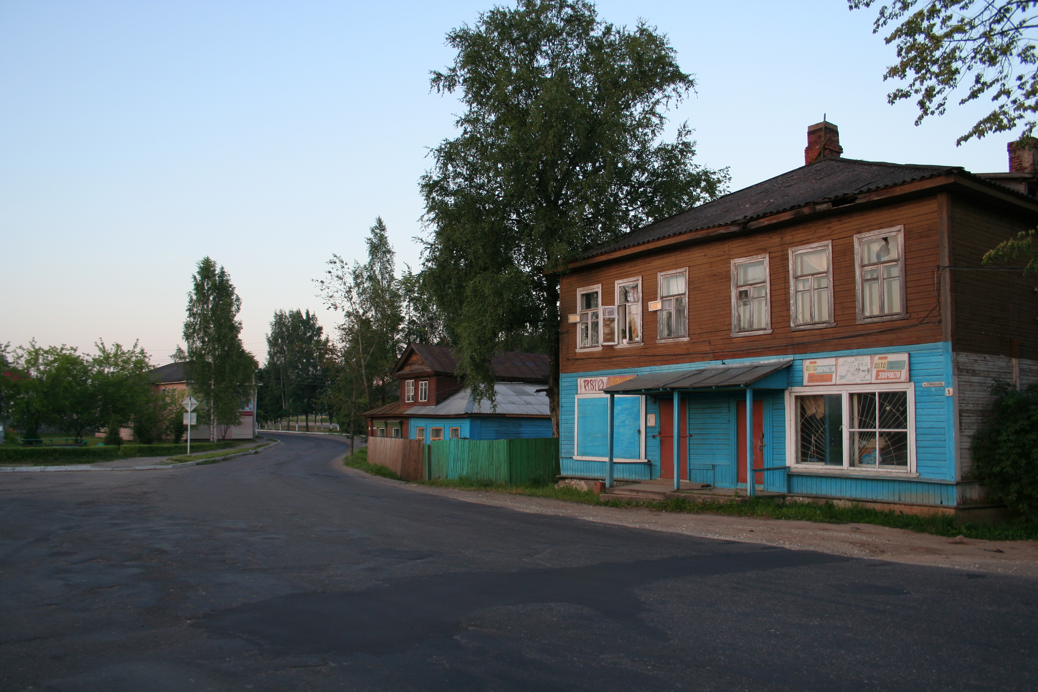 Stadt Okulowka (Oblast Nowgorod, Russland). Diverse Wohnhäuser.